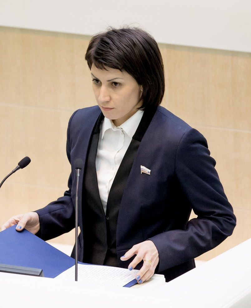 Татьяна Лебедева — российская спортсменка, член Совета Федерации